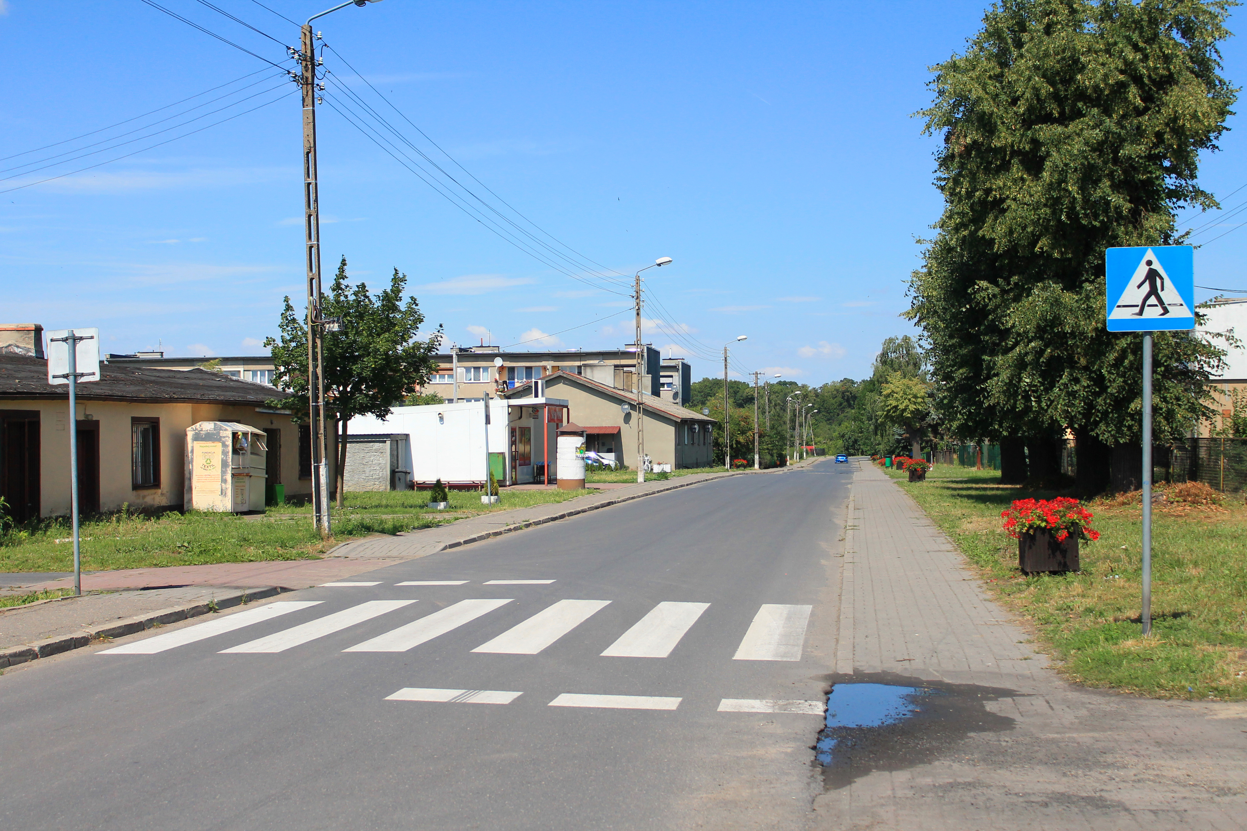 Działyń, zabudowa wzdłuż drogi